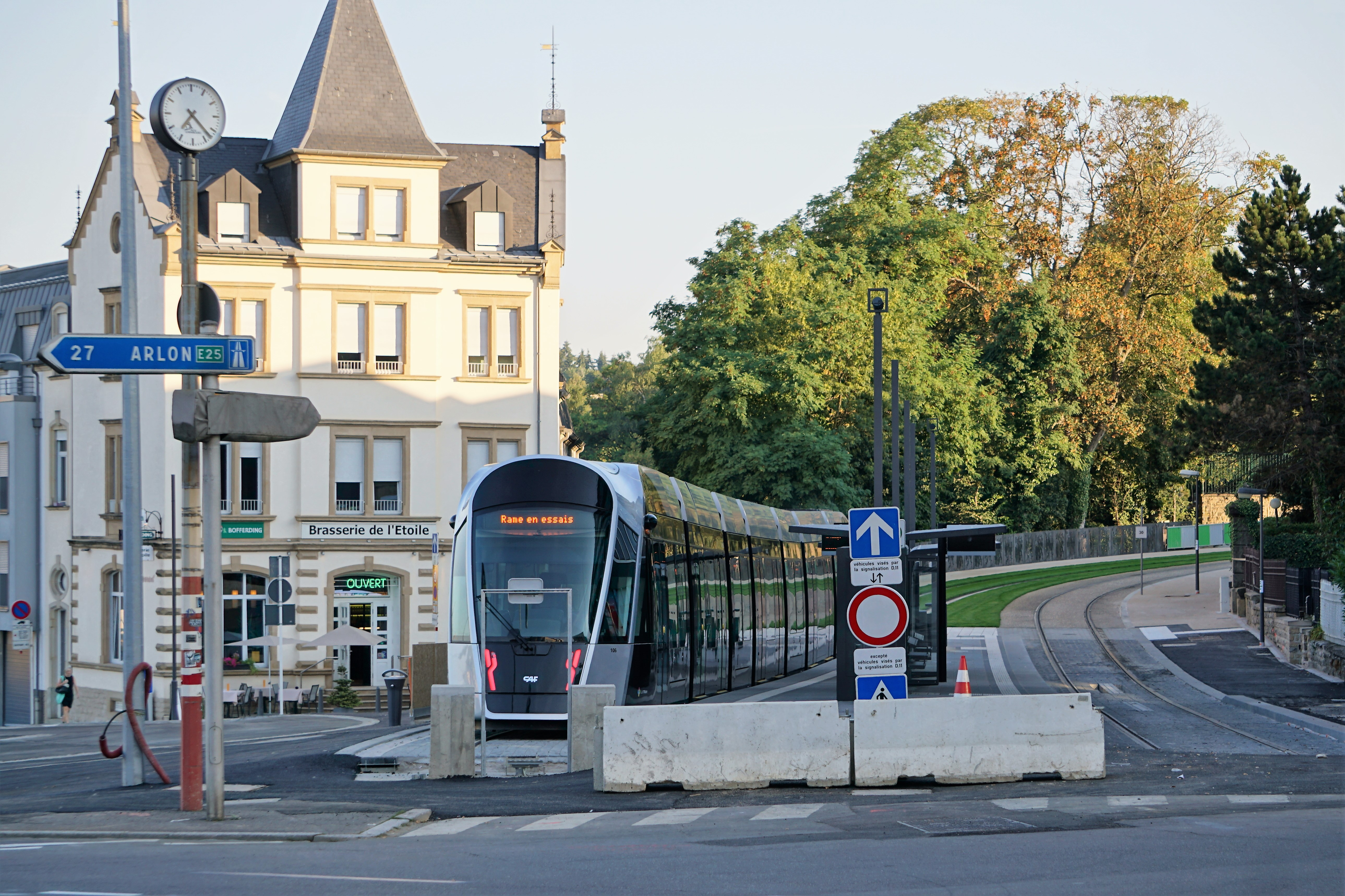 Luxembourg, tram à la station Stäreplaz/Étoile, quelques heures avant la mise en service officielle.